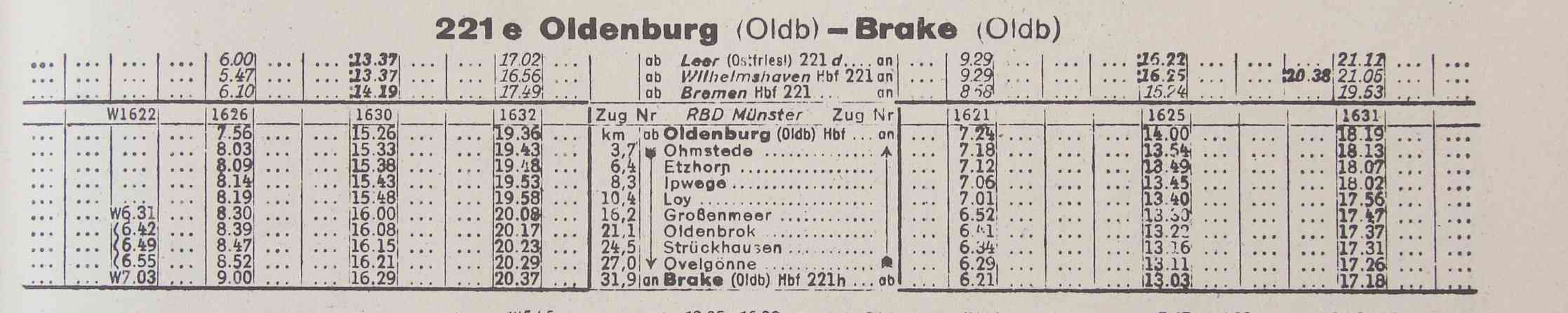 Fahrplan 1944 der Bahnstrecke Oldenburg - Brake